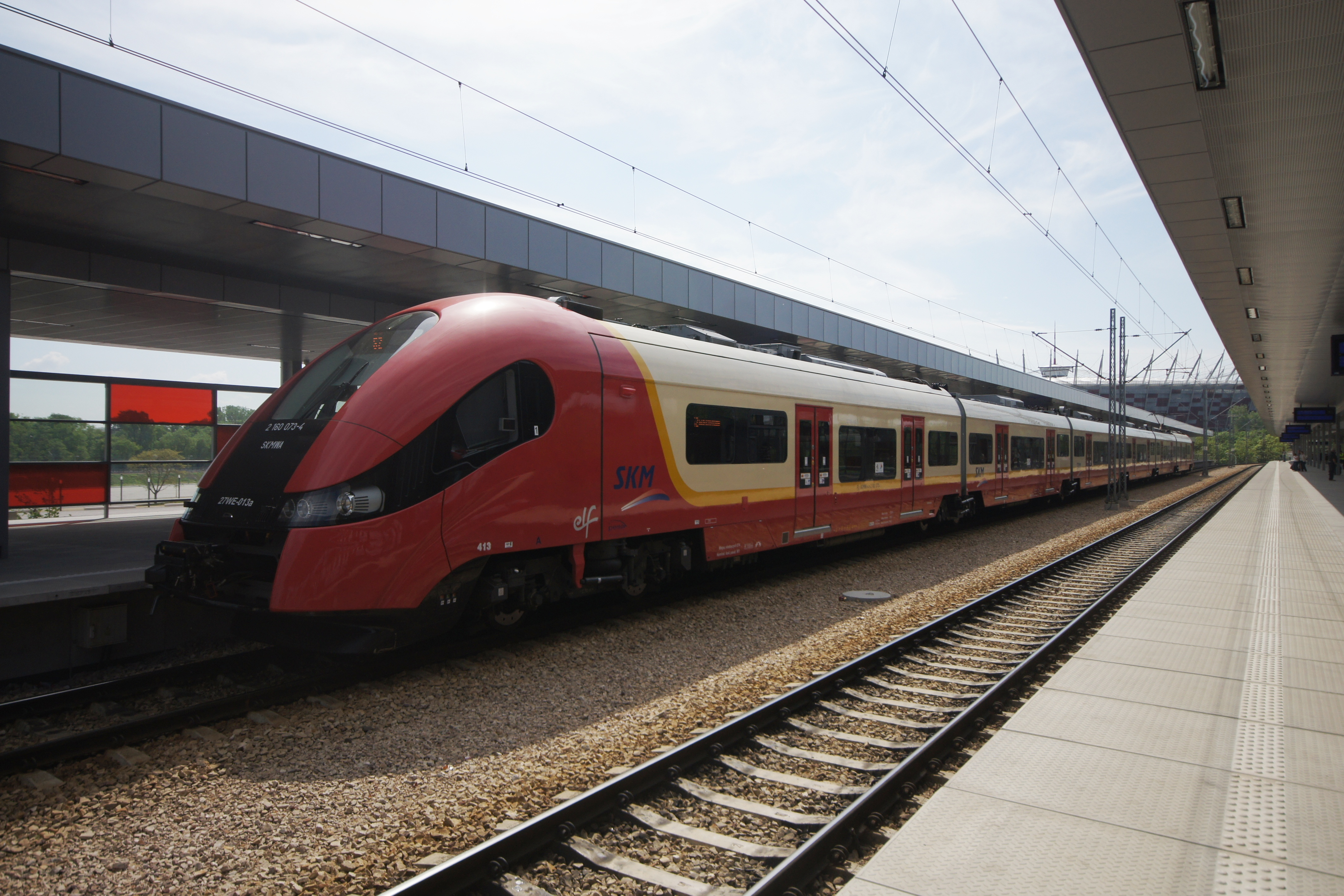 27WE SKM Warszawa - Stacja Warszawa Stadion - 05.05.2012 - dzień otwarcia po remoncie